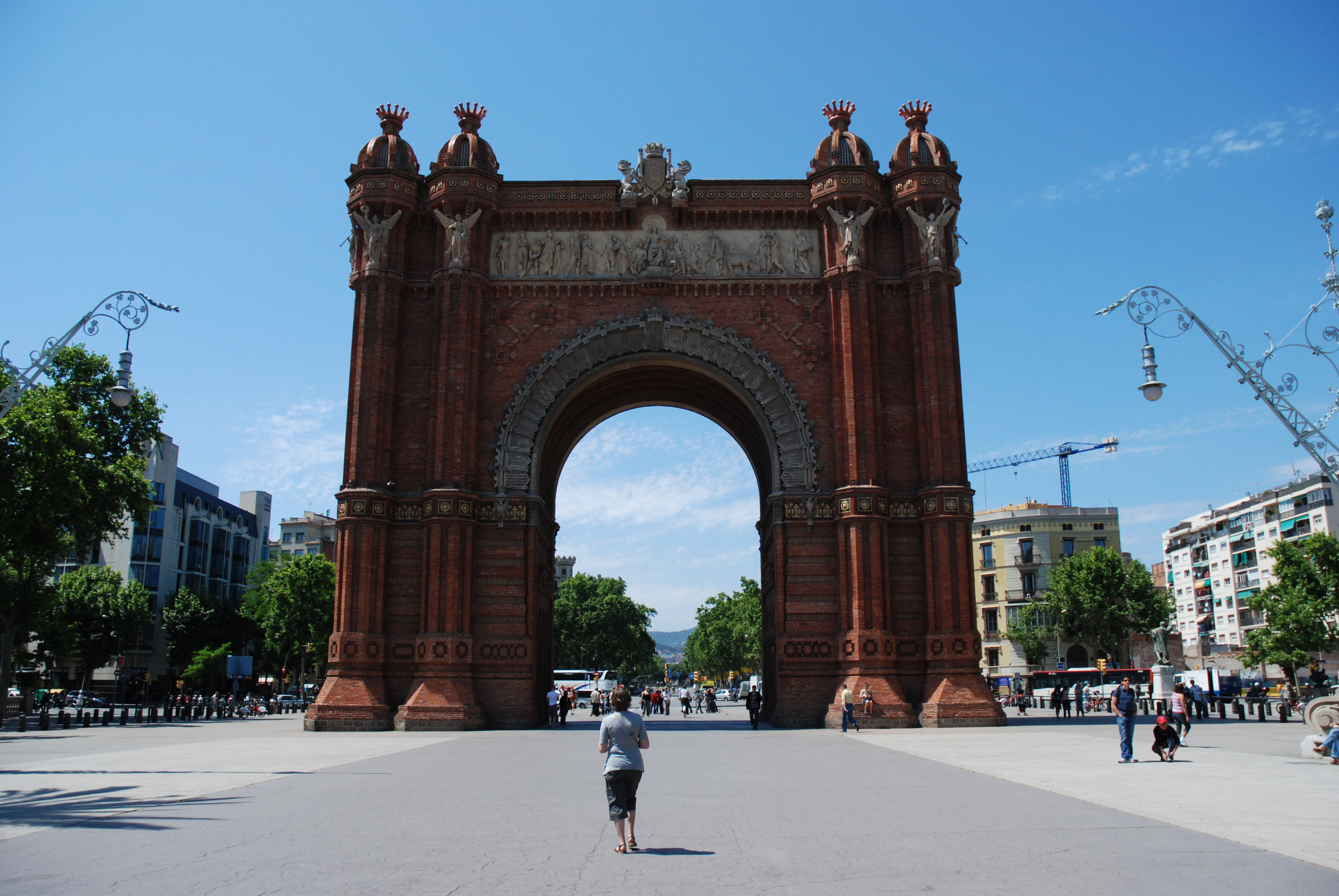 Arc del Triomf in Barcelona